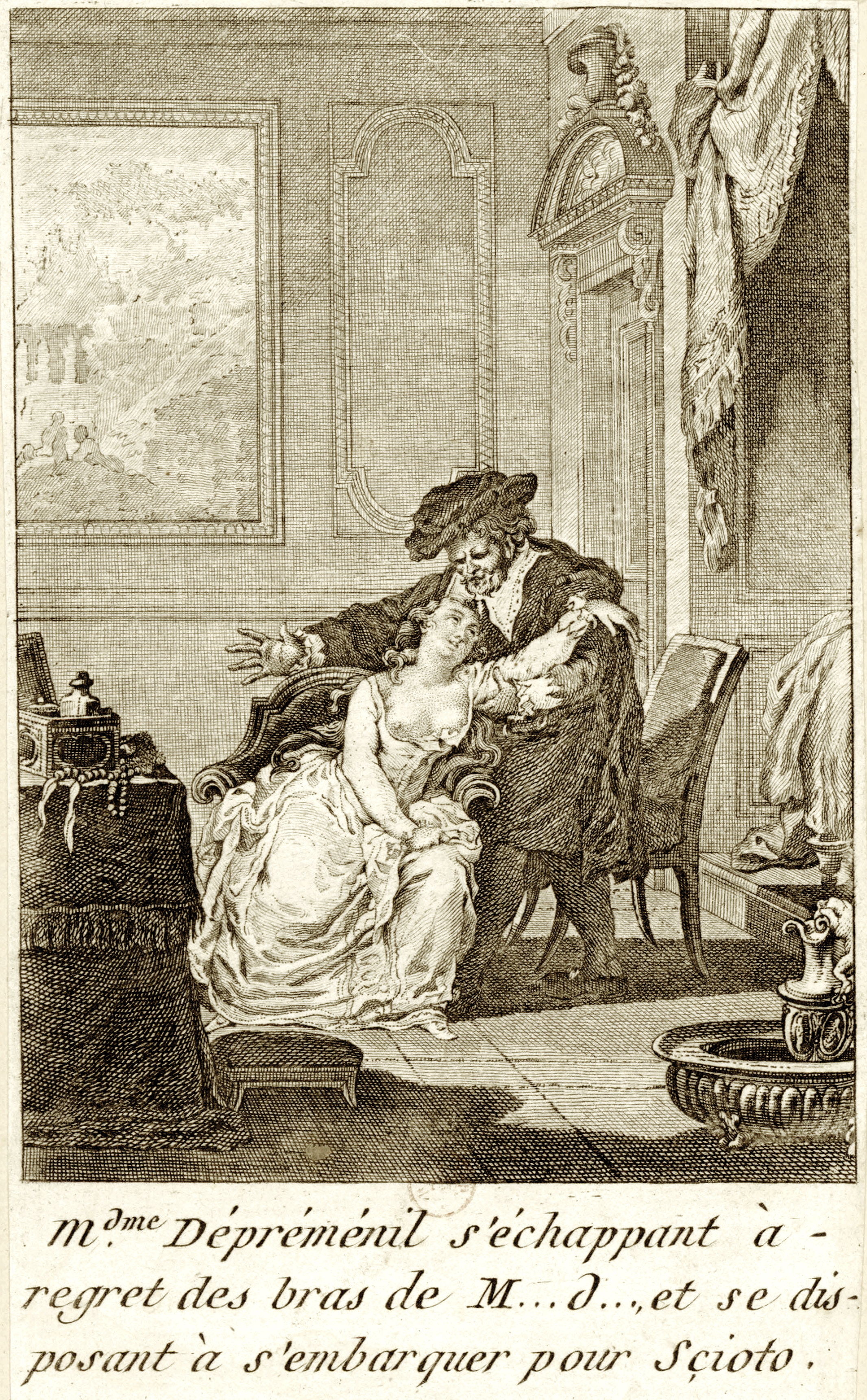 Éditeur : [s.n.] (Paris) Date d'édition : 1790 Sujet : Éprémesnil, Françoise-Augustine Duval d' (1754-1794) Sujet : France (Révolution) (1789-1799Emigrés Sujet : Scènes galantes -- 1789-1799